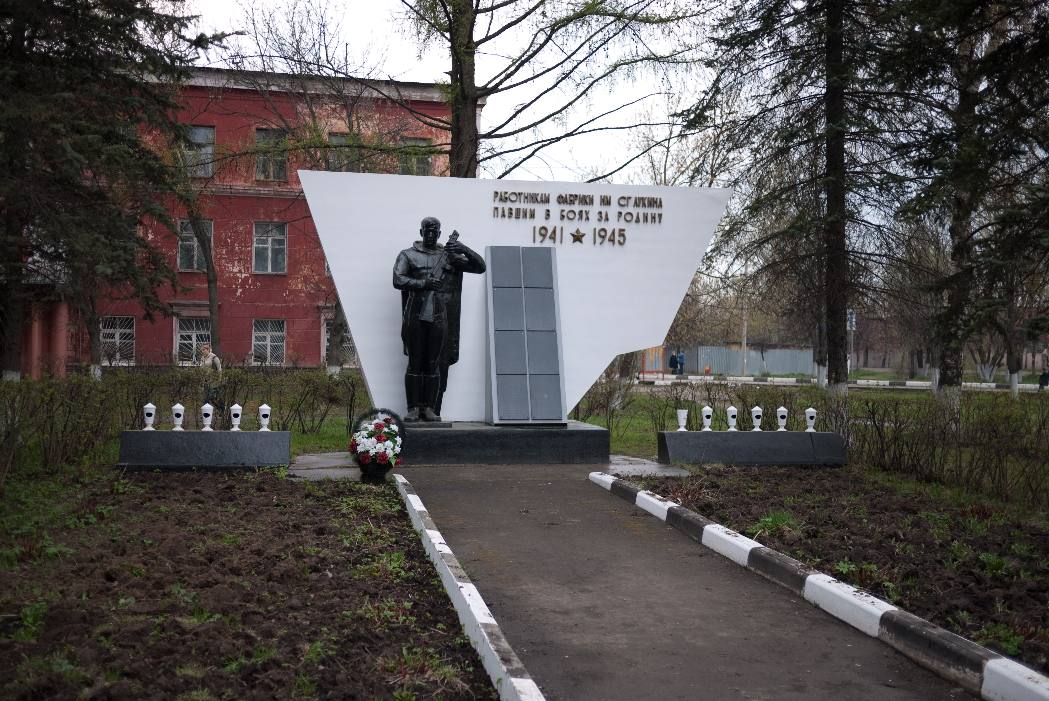 Мемориал «Скорбящий». Памятник советским воинам — работникам фабрики им. Лукина, павшим боях за Родину в годы Великой Отечественной войны. Установлен в 1972 г. Скульптор А. Новохатский. Город Ивантеевка Московской области.